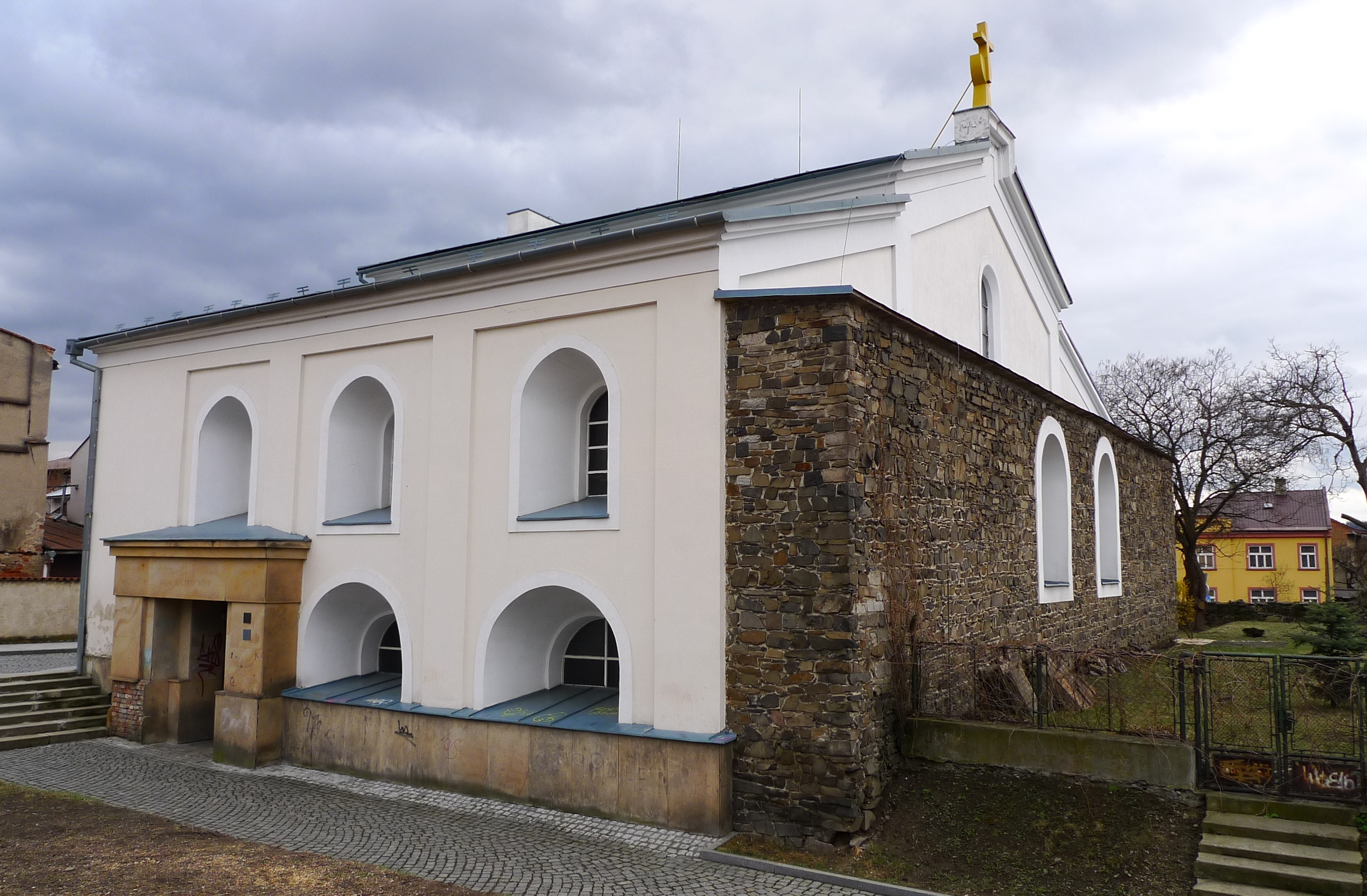 Synagoga - bývalá (Lipník nad Bečvou), Perštýnská, Lipník nad Bečvou